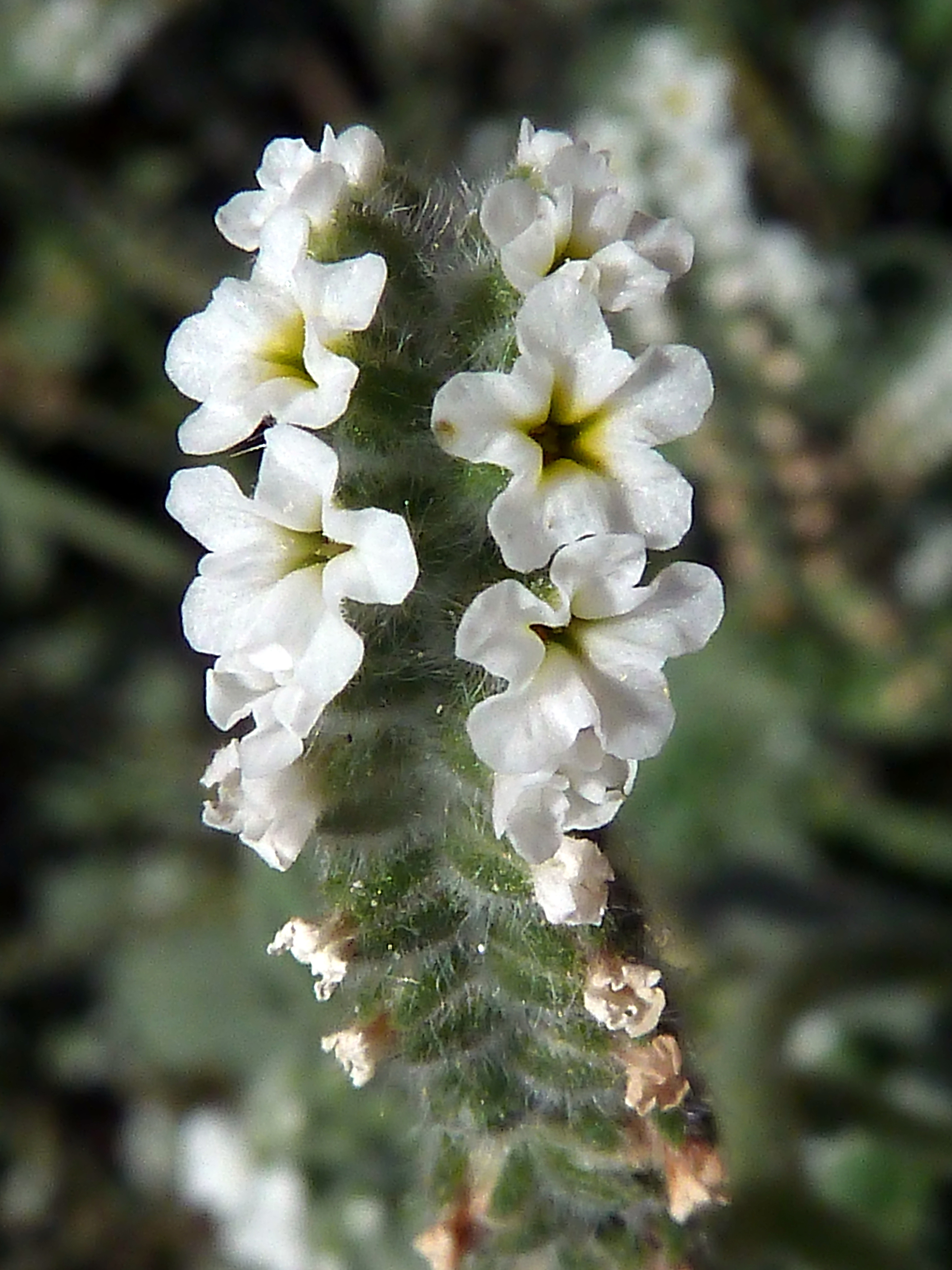 Heliotropium europaeum (Hierba verruguera, tornasol, verrucaria, ...) - Inflorescencia escorpioide - Calle Compositor Manuel Berná García, Albatera, Provincia de Alicante (España).